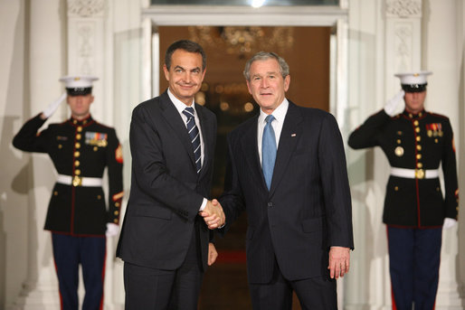 George W. Bush recibe al presidente español, José Luis Ropdríguez Zapatero en la Casa Blanca con ocasión del encuentro del G-20. 14 de noviembre de 2008